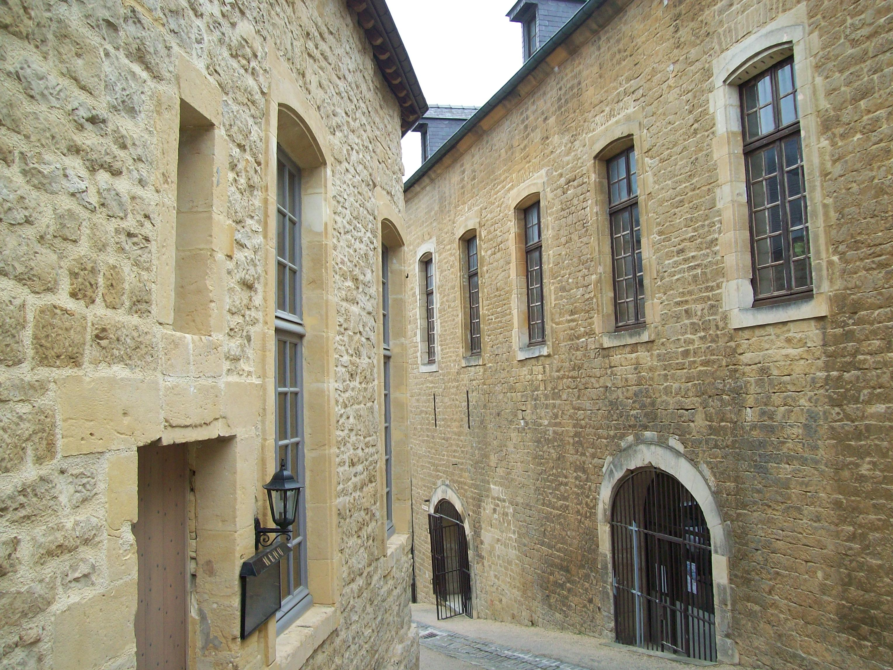 Classé monument historique en 1963, il est le plus grand d'Europe. Turenne y naquit en 1611.